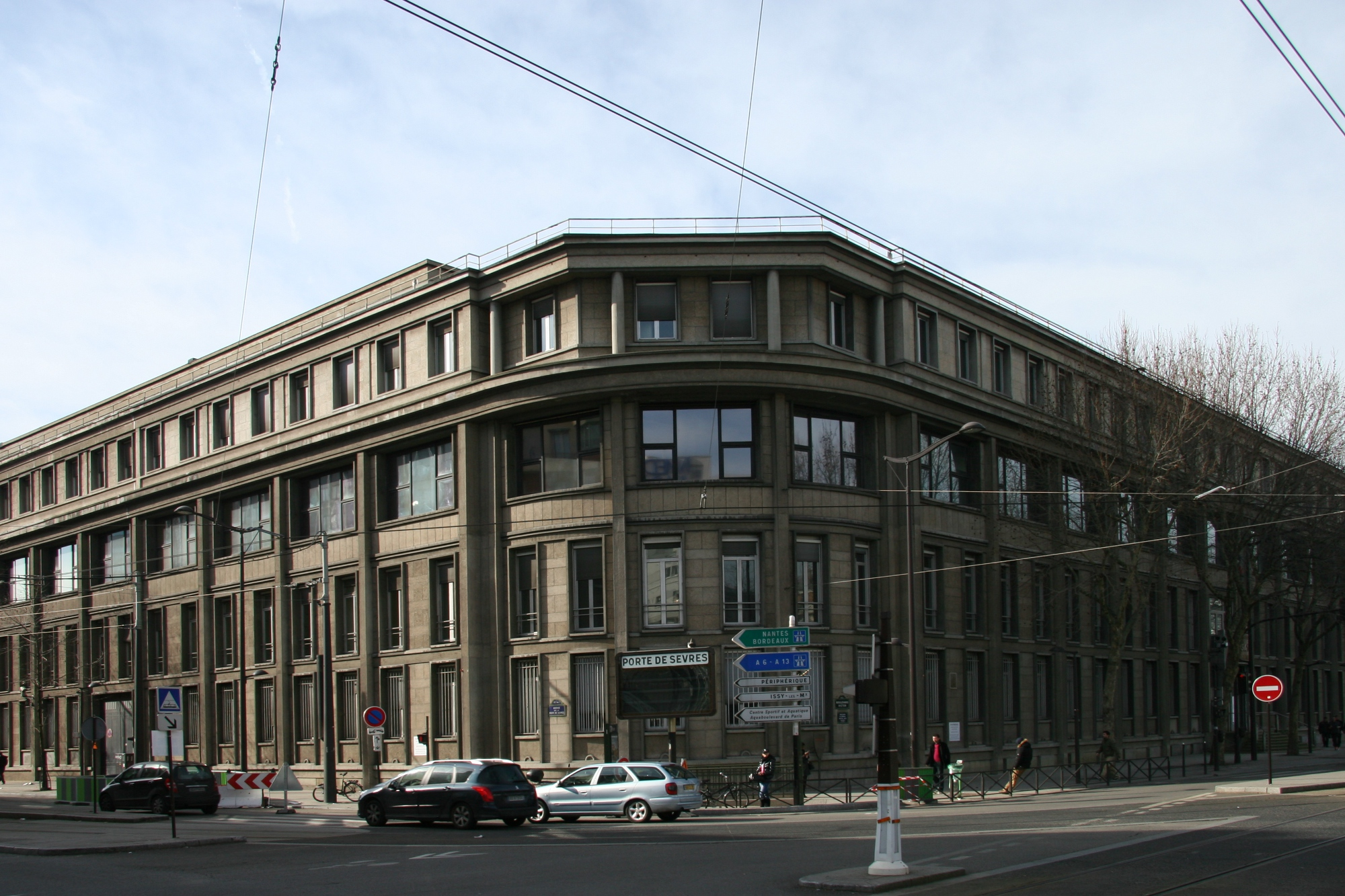 Laboratoire de la Marine, appellation propre et enregistrée comme telle au titre des monuments historiques. Le bâtiment Perret donnant sur le boulevard Victor et l'avenue de la Porte de Sèvres comporta en réalité des bureaux d'études en construction navale et cachait les moyens d'essais navals tel que des bassins d'essais des carènes détruits en vue de l'édification de l'Hexagone Balard.